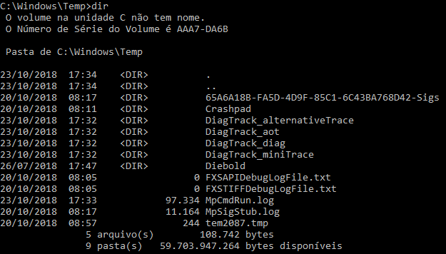 Resultado do comando dir no prompt do Windows.